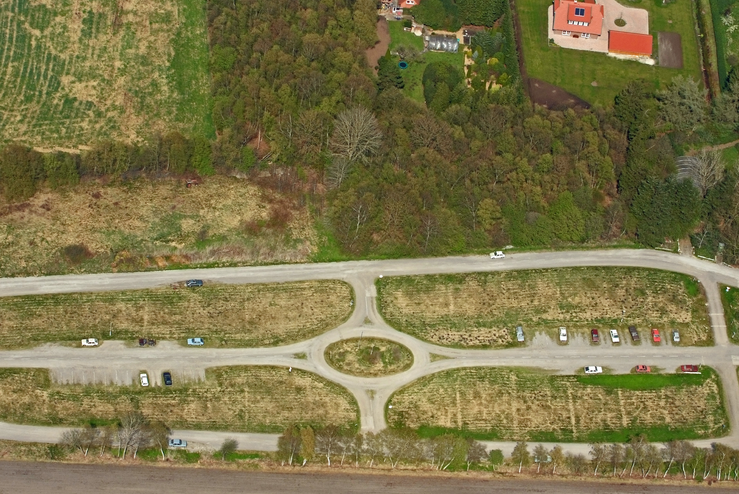 Verkehrsübungsplatz Jeddeloh / Fotoflug von Nordholz-Spieka nach Oldenburg und Papenburg